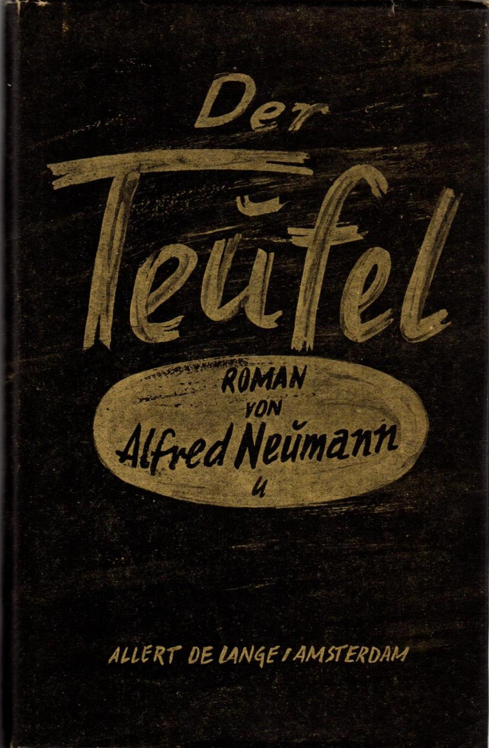 Alfred Neumann, Der Teufel, Allert de Lange, Amsterdam, 1935. Erste Ausgabe im Exil (137.Tsd.). Einbandgestaltung von Paul Urban. (Für dieses Werk erhielt Alfred Neumann 1926 den Kleist-Preis)